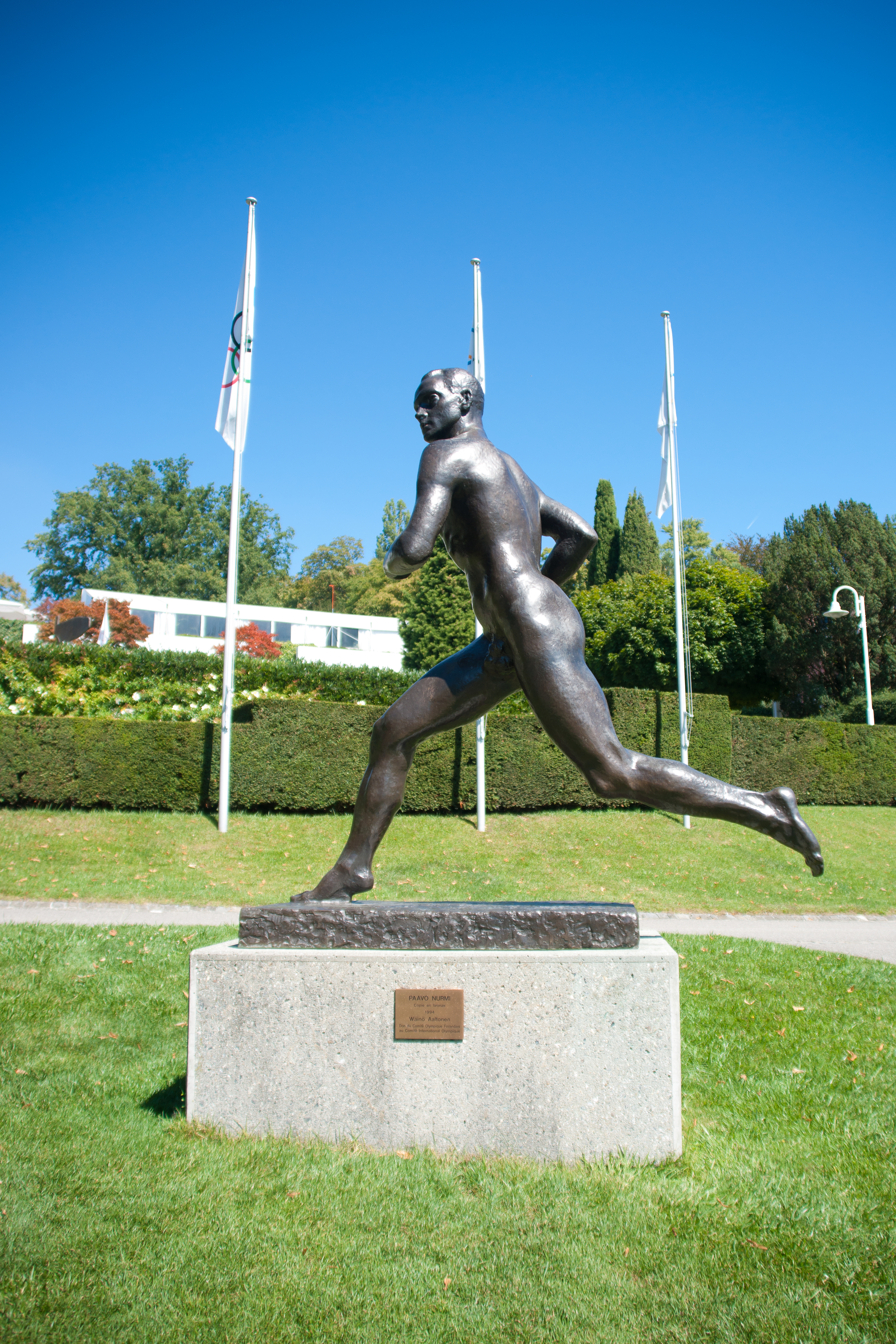 Sculpture de Paavo Nurmi par Wäinö Aaltonen au musée du CIO à Lausanne.